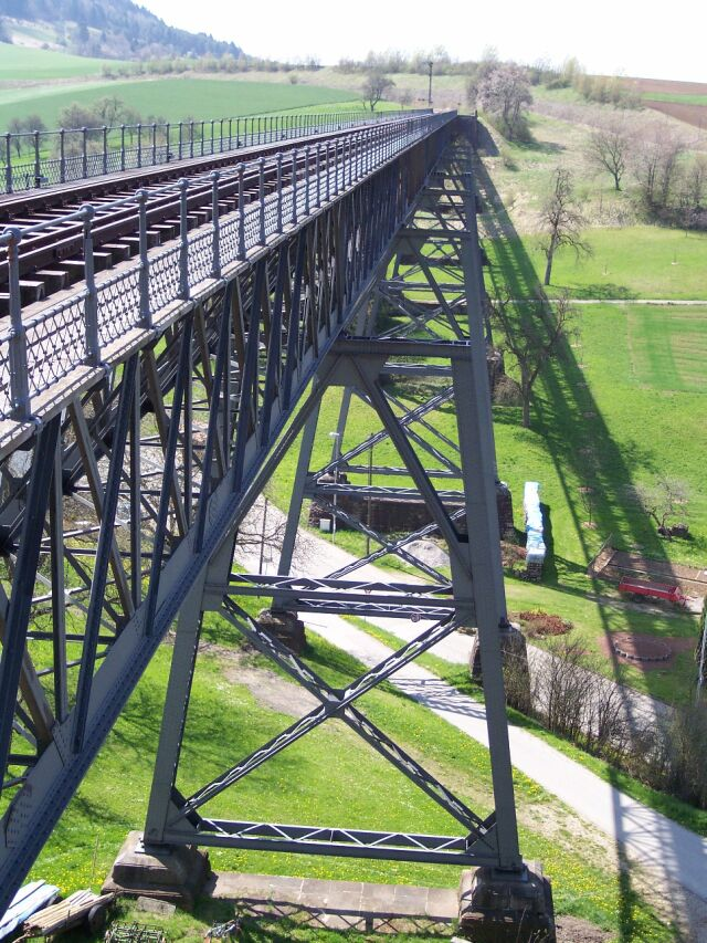 Talbrücke Epfenhofen der Wutachtalbahn, eigenes Bild.